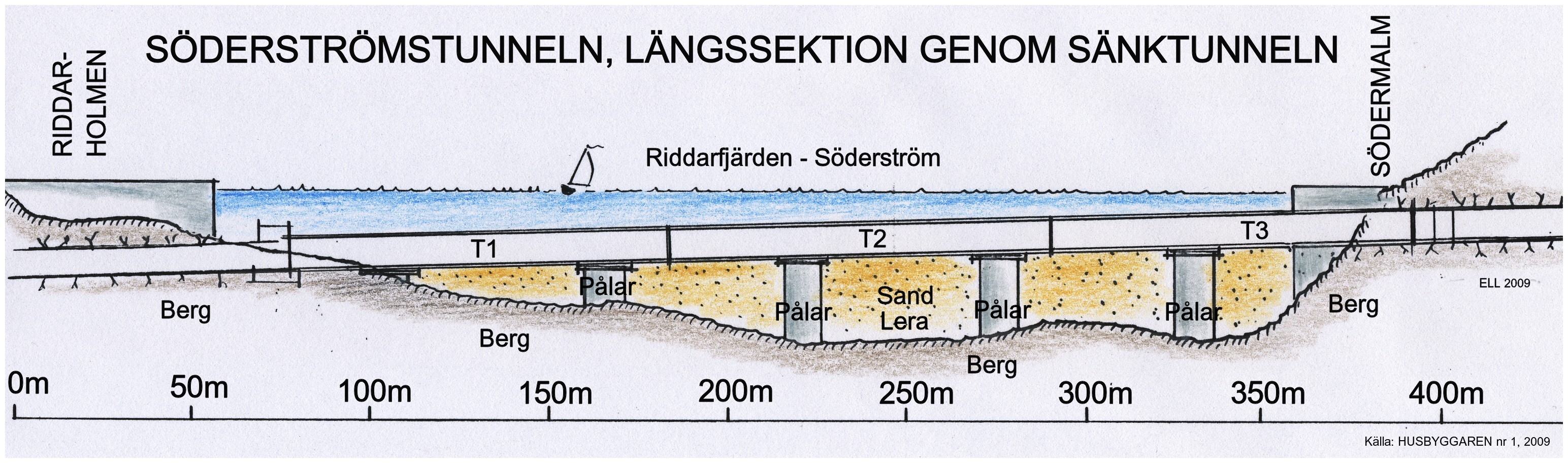 Söderströmstunneln i Stockholm. Sektion genom sänktunneln. Källa: Husbyggaren nr 1 2009